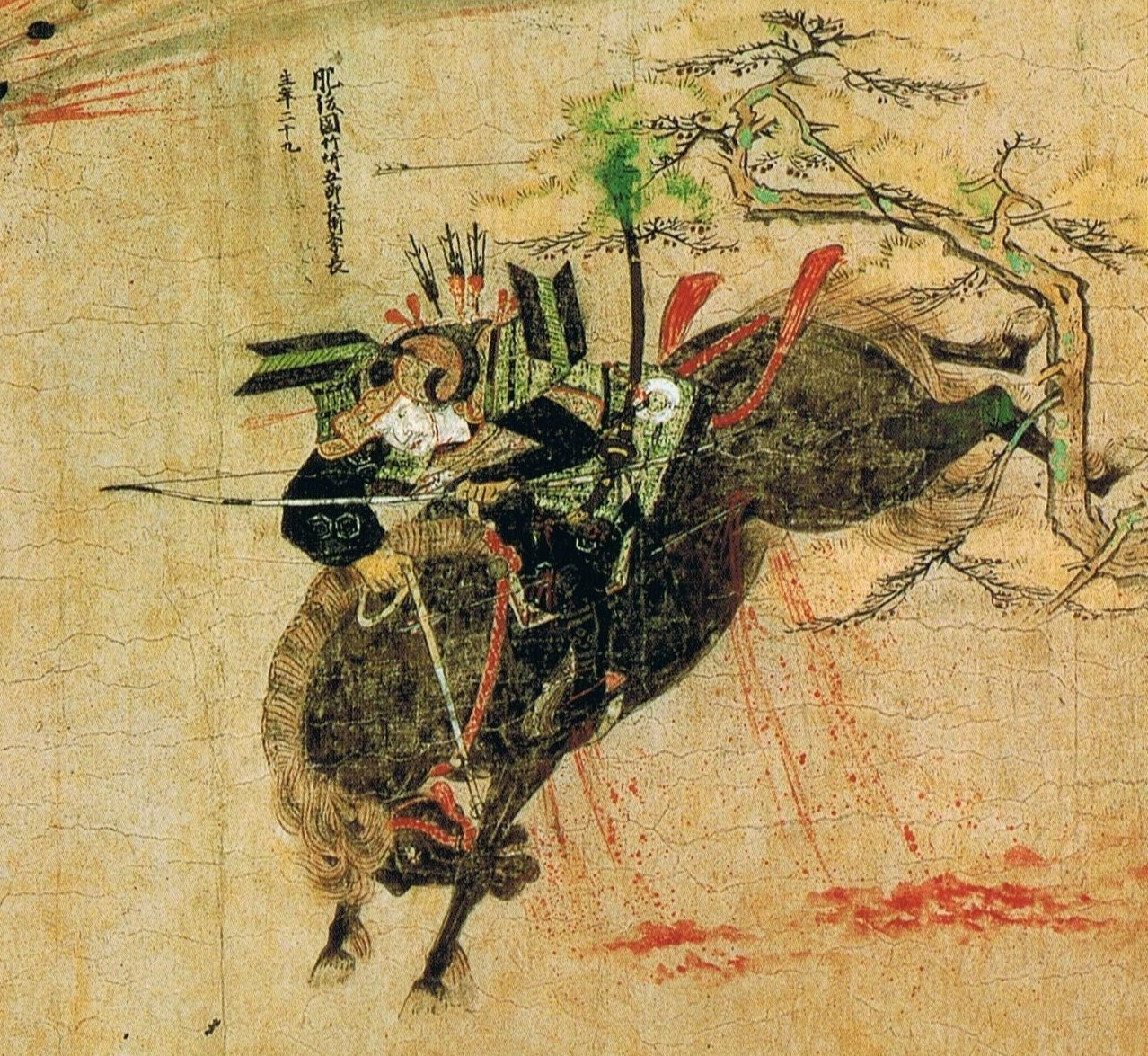 『蒙古襲来絵詞』前巻、絵七【文永の役】矢・槍・鉄砲が飛び交う中を突撃する竹崎季長。